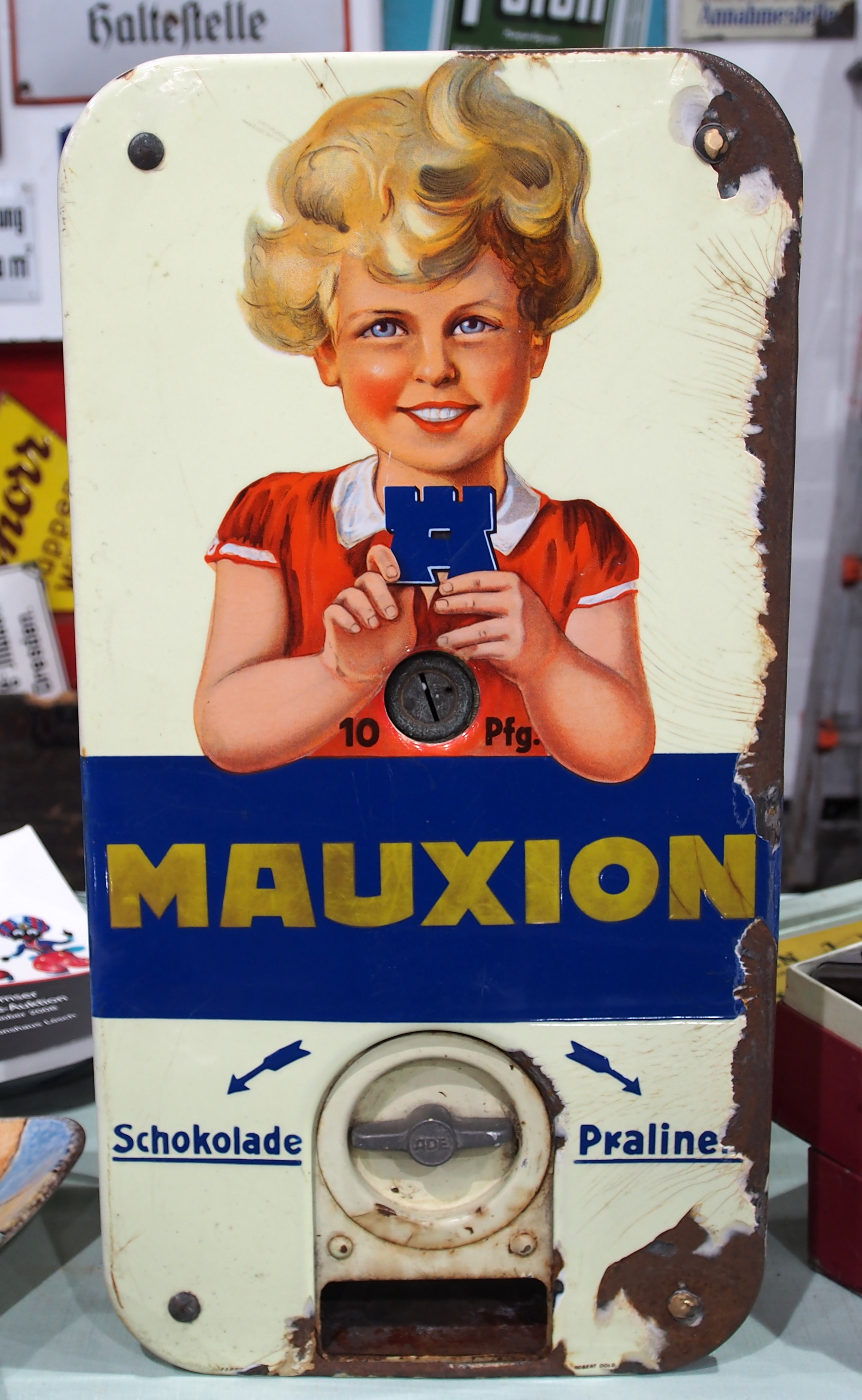 Mauxion dispenser